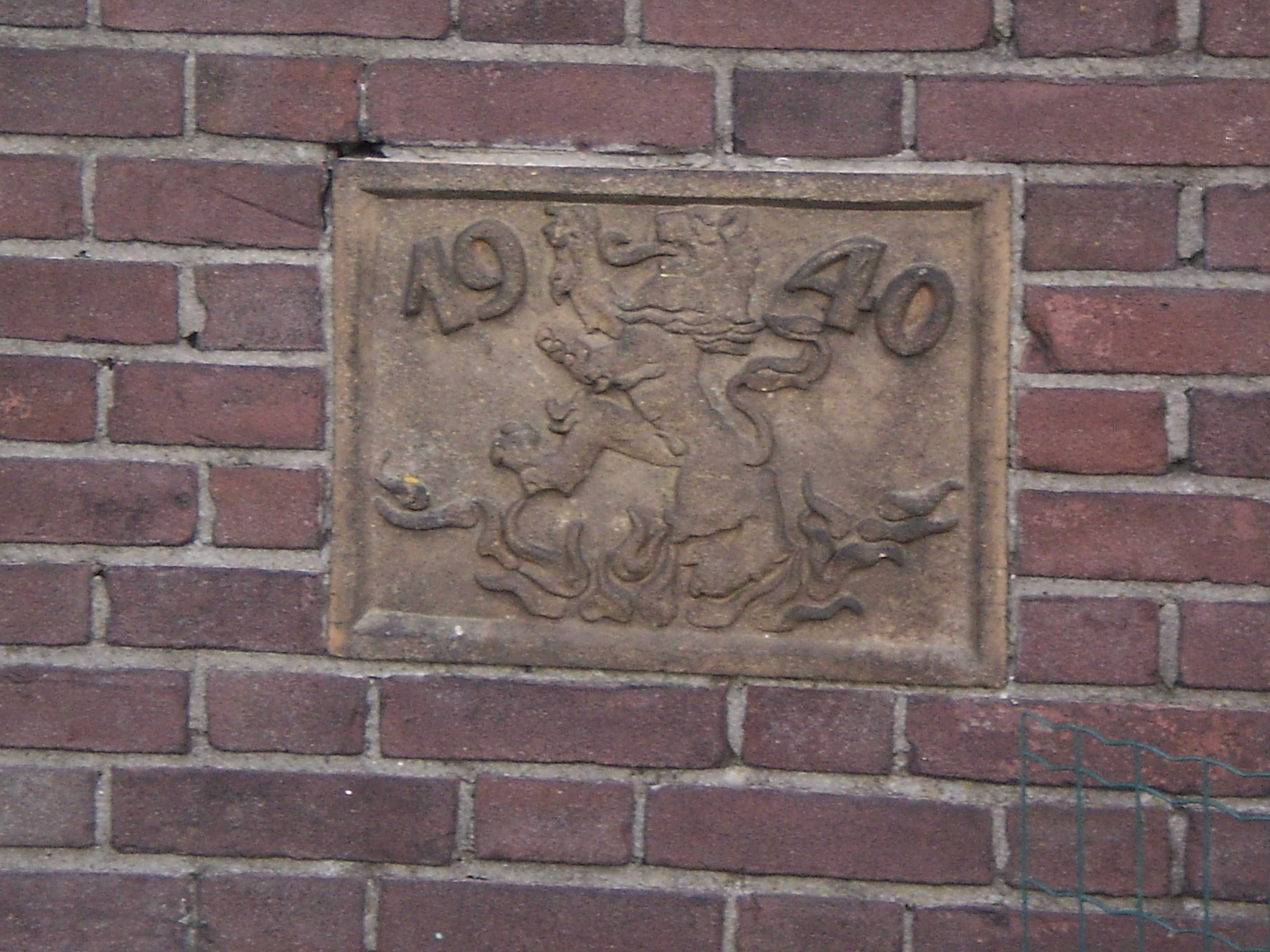 Wederopbouwsteen van een boerderij aan het Zuidereind in Baarn-Hoogland